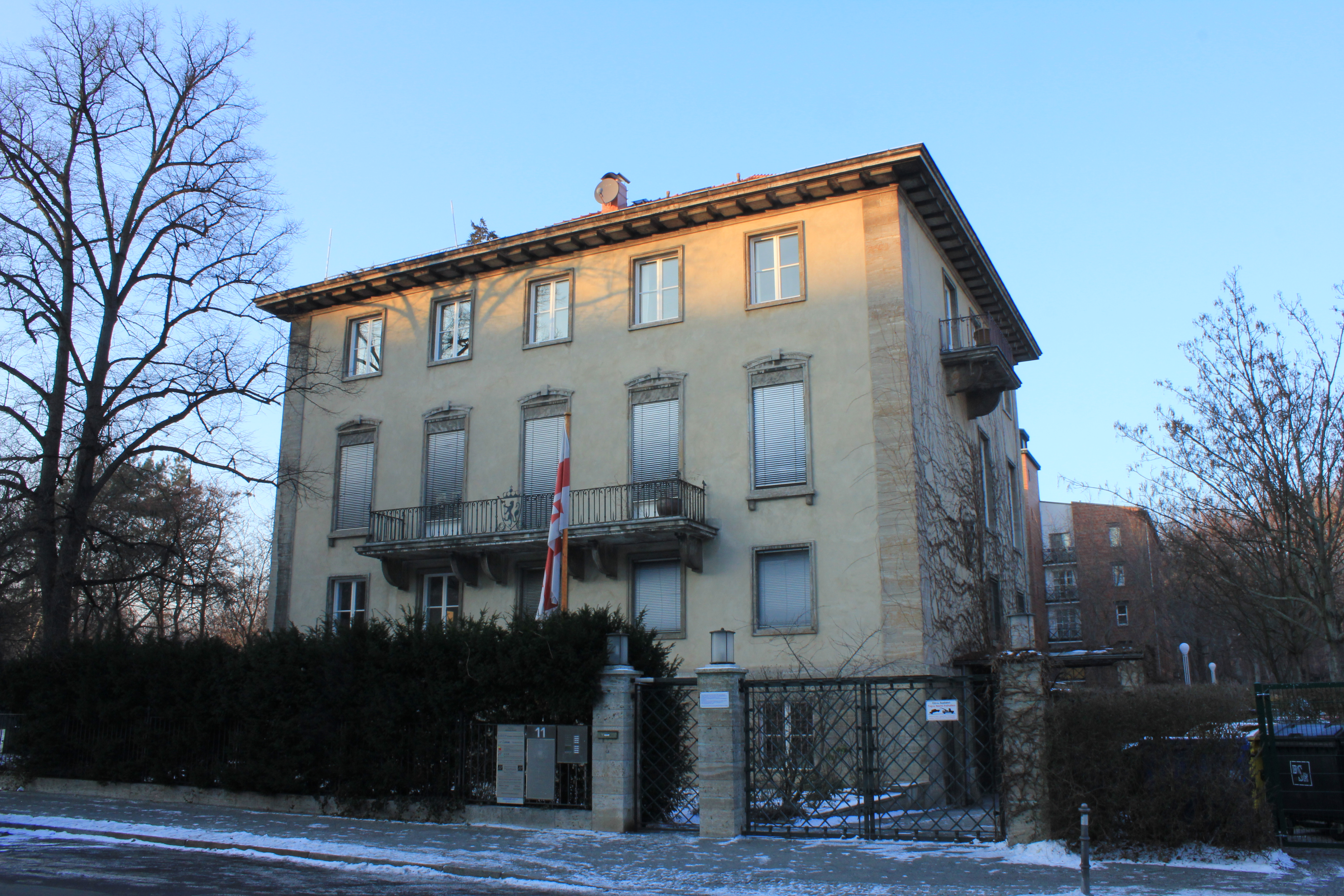 Doppelmietshaus 1885-86 von Heino Schmieden und Heinrich Aldenkirchen